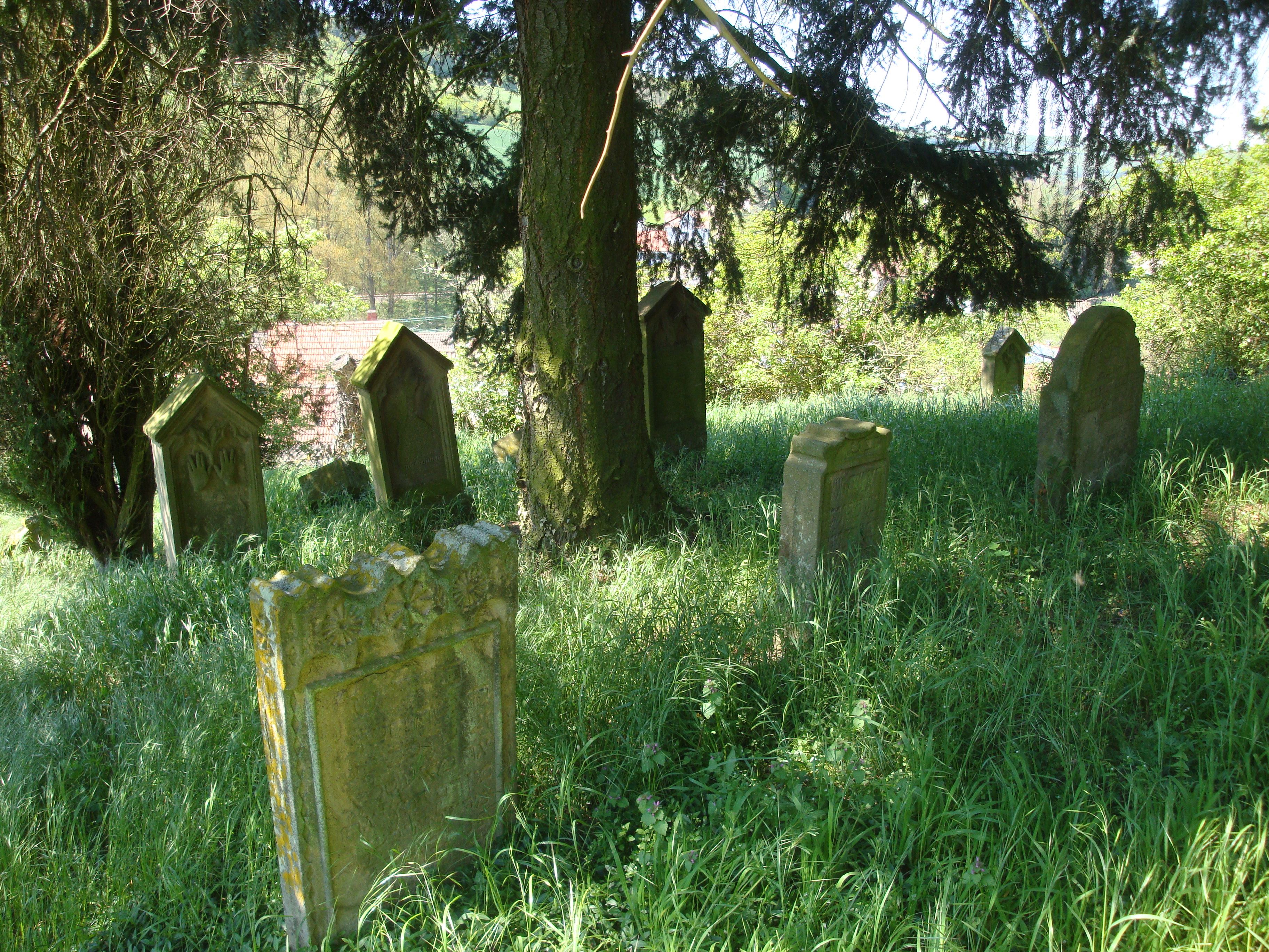 Kleiner Friedhof der etwas versteckt am Ende der Bergstrasse liegt.